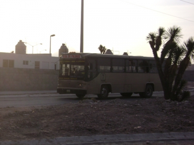 Ruta 7 Real de Palmas de Transregio